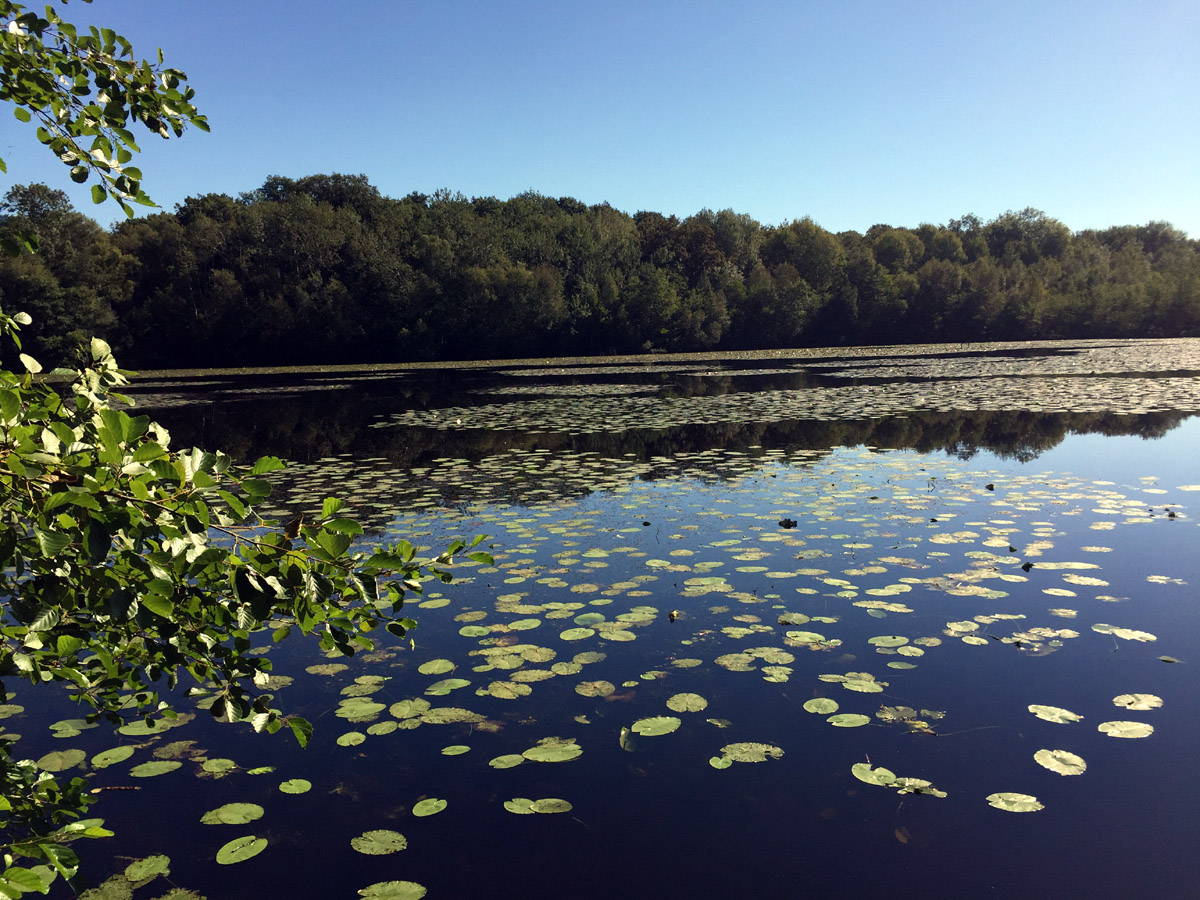 Étang Neuf - Gambaiseuil - Yvelines